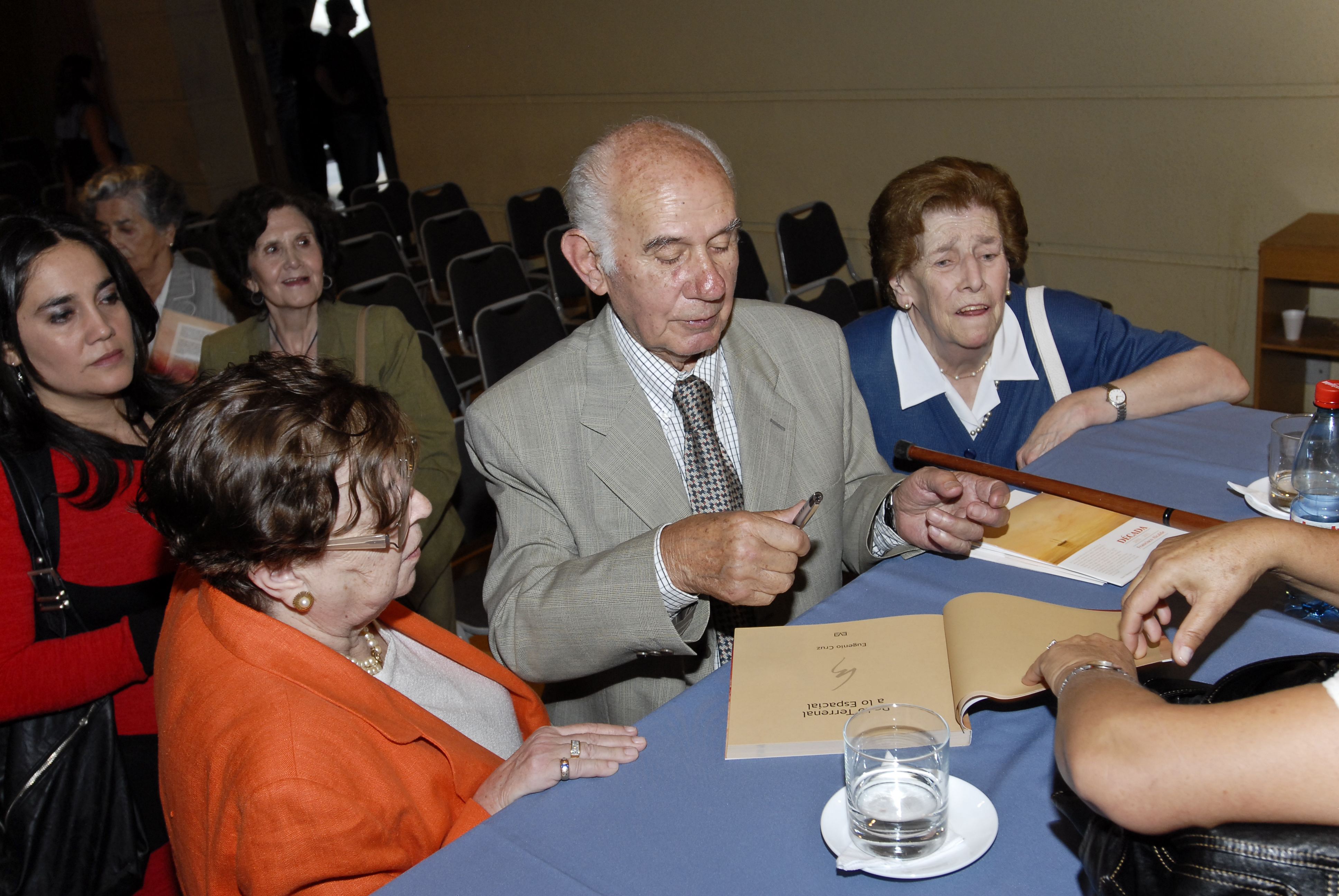 El pintor y poeta Eugenio Cruz Vargas (1923 - 2014), en el lanzamiento de su libro “Del paisaje a la abstracción”, dedica y autografía ejemplares luego de la ceremonia el 8 de abril de 2011 en el Instituto Cultural de Providencia. Los ingresos obtenidos por la venta de los ejemplares en librerías fueron donados por el autor al fondo de becas para jóvenes talentos musicales administrado por esa institución. Autor de la fotografía: José Cruz, quien en calidad de autor y propietario titular de la misma otorgó el consentimiento para publicar y difundir en la red internet esta imagen bajo las condiciones que establece la Licencia de Uso Creative Commons, Atribución-Compartigual 3.0 Unported (CC BY-SA 3.0).